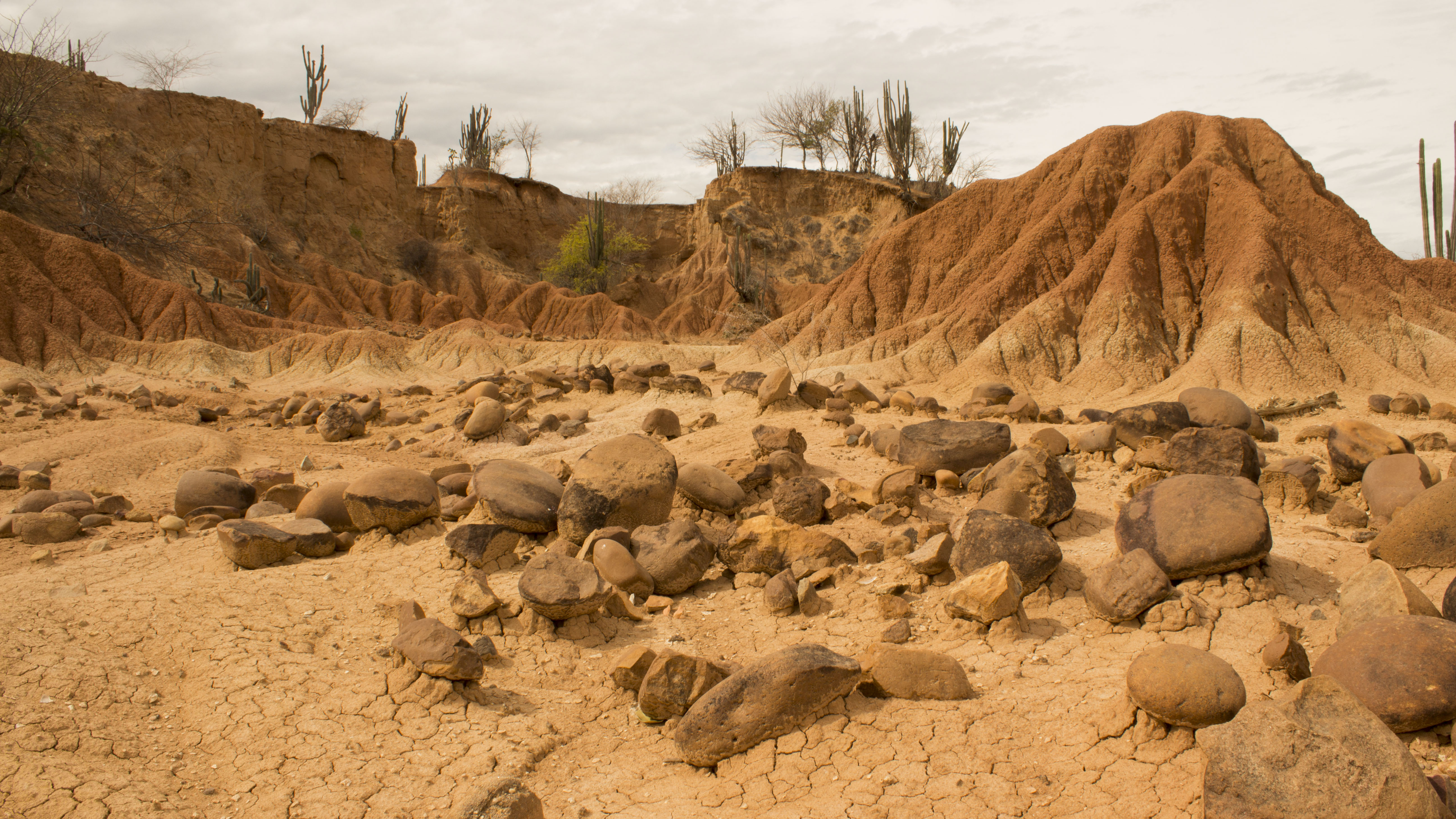 Esta fotografía fue tomada en el municipio colombiano con código 41872.